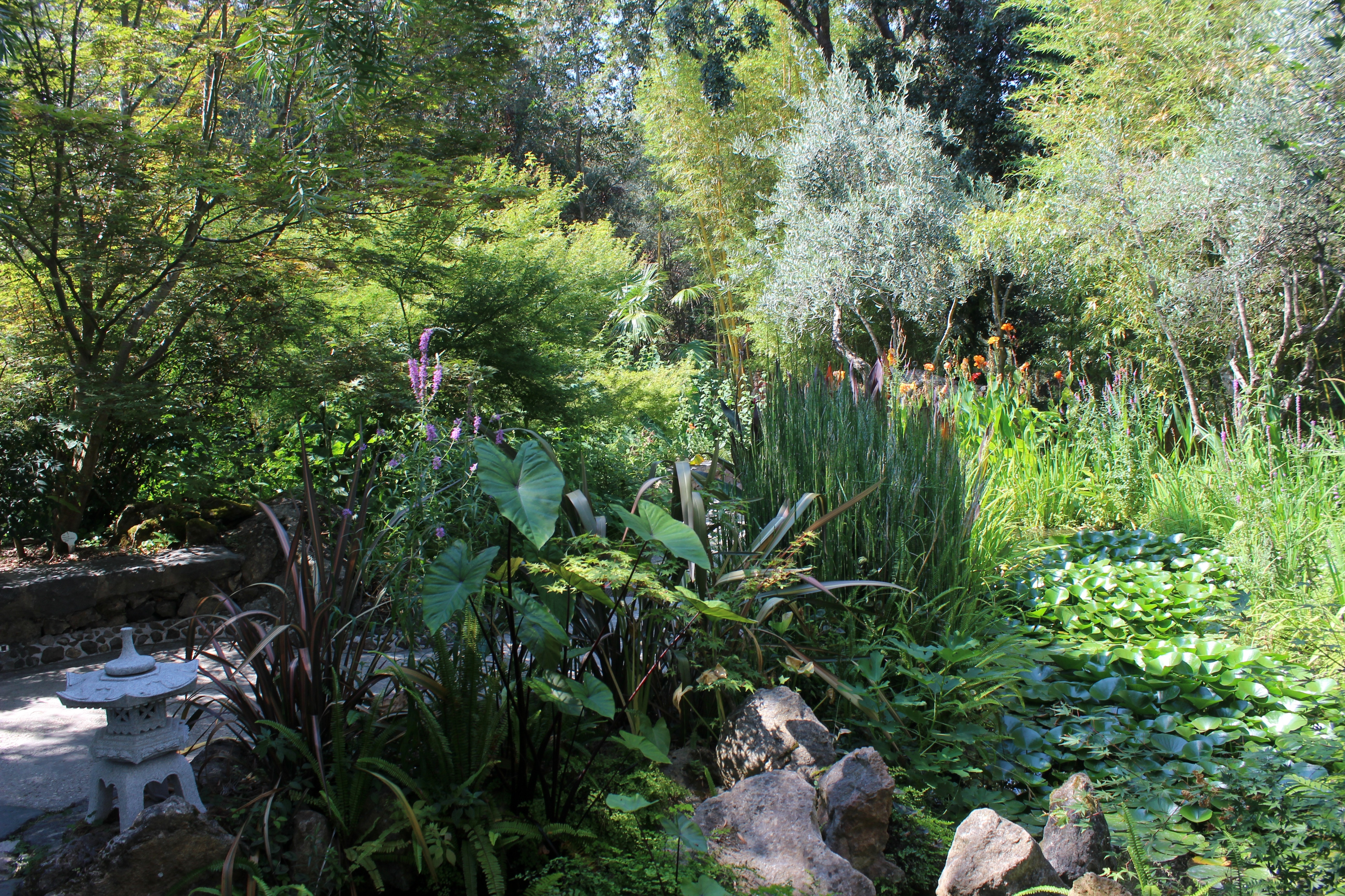 Jardín oriental. La Mortella.